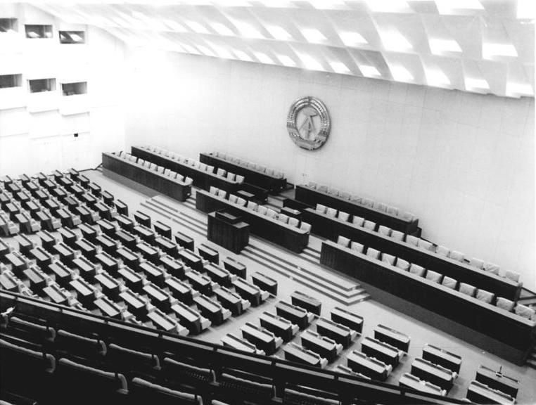 ADN-ZB-/Junge- 21.4.76 Berlin: Palast der Republik Blick in den Plenarsaal der Volkskammer.